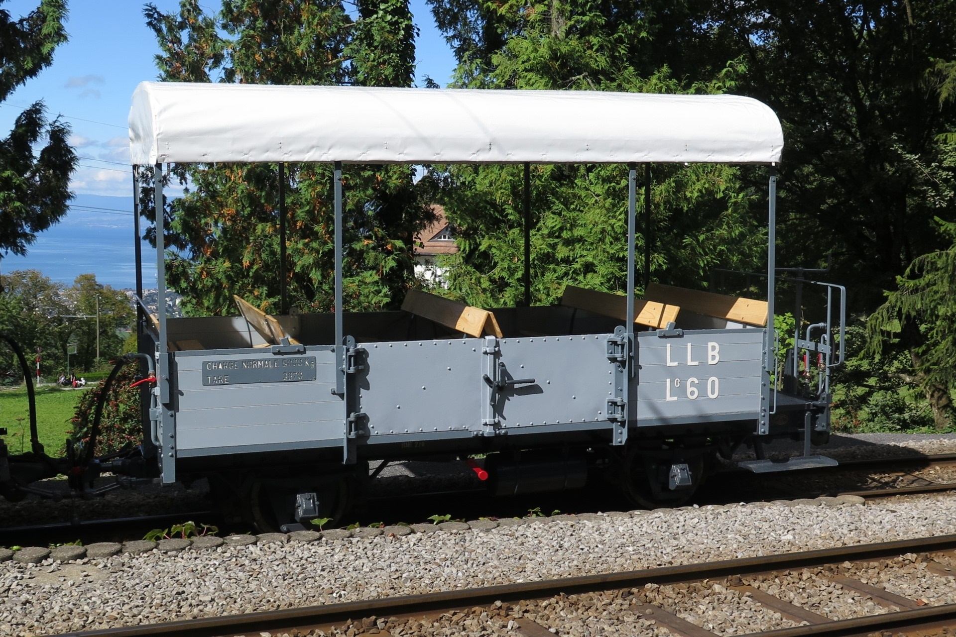 Offener, für den Personentransport umgerüsteter Niederbord Güterwagen L2 60 (Aussichtswagen) der ehemaligen Leuk–Leukerbad-Bahn (LLB), heute Verkehrsbetriebe Leuk–Leukerbad und Umgebung (LLB), bei der Museumsbahn Blonay-Chamby in Chamby-Musée (Chaulin). Der Güterwagen L2 60 wurde auf den Anlass Das Wallis auf Besuch bei der BC (100 Jahre LLB und 200 Jahre Kanton Wallis) vom Samstag, den 12. und Sonntag, den 13. sowie Samstag, den 19. und Sonntag, den 20. September 2015 hin, zusammen mit Niederbord Güterwagen M2 51 und dem geschlossenen Güterwagen K2 41 umfassend restauriert. Es ist mit Stand September 2015 vorgesehen den nicht restaurierte geschlossene Güterwagen K2 41 nach Inden abzugeben. Er soll vor dem durch eine Genossenschaft betriebenen Dorfladen, der sich im ehemaligen Bahnhof befindet, aufgestellt werden.